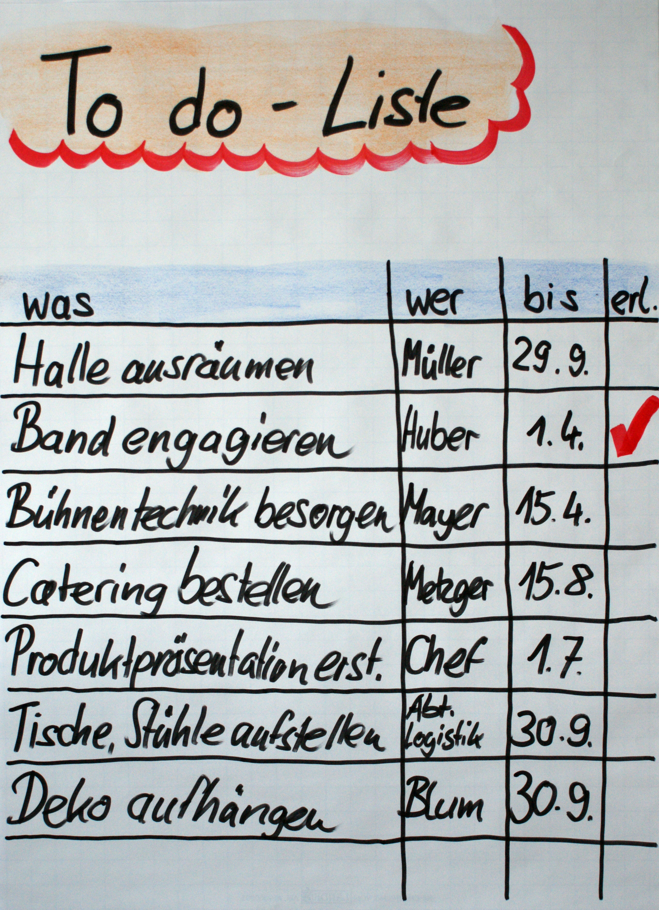 ToDo-Liste auf Flipchart